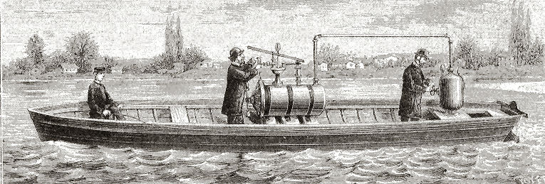 Gravură a celei de a doua experiențe a lui Alexandru Ciurcu din 16 decembrie 1886